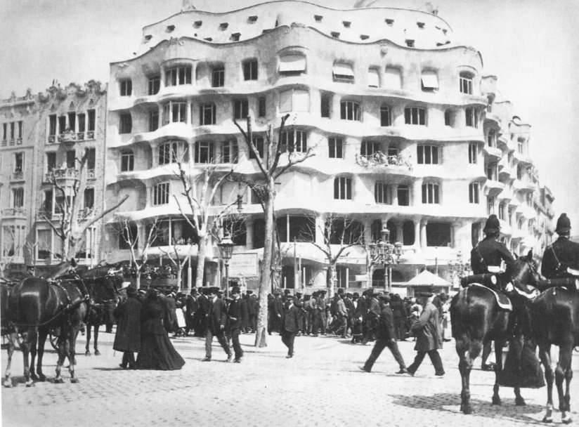 La Casa Milà, de Antoni Gaudí, en 1911.